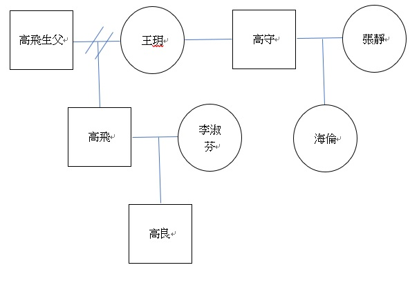 電影《大喜臨門》果爾勒斯家系示意圖